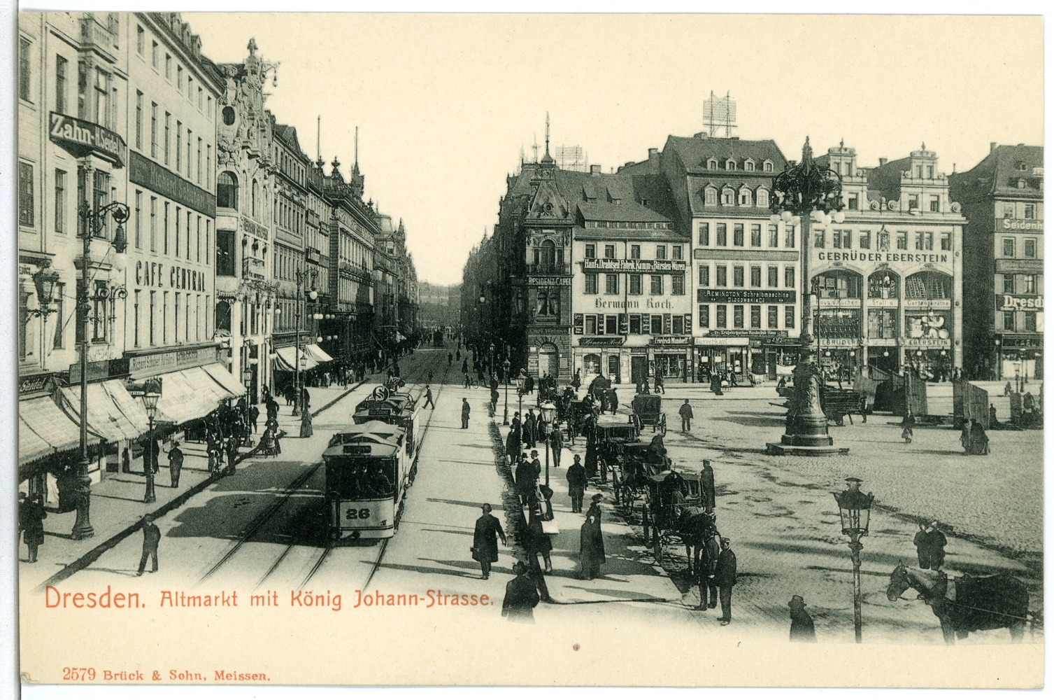 Dresden; Altmarkt und König-Johann-Straße, Straßenbahn, Pferdedroschke This postcard is from publisher Brück & Sohn in Meißen ( postcard has a unique number 02579 and is available in a higher resolution at the publisher. This images was uploaded in a cooperation project between Wikipedians and the publisher.